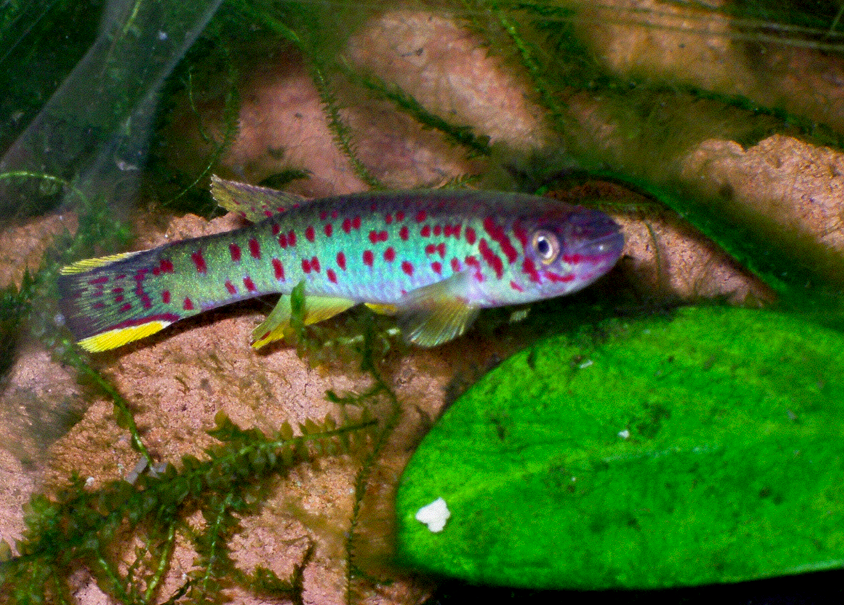 Fundulopanchax scheeli (male)